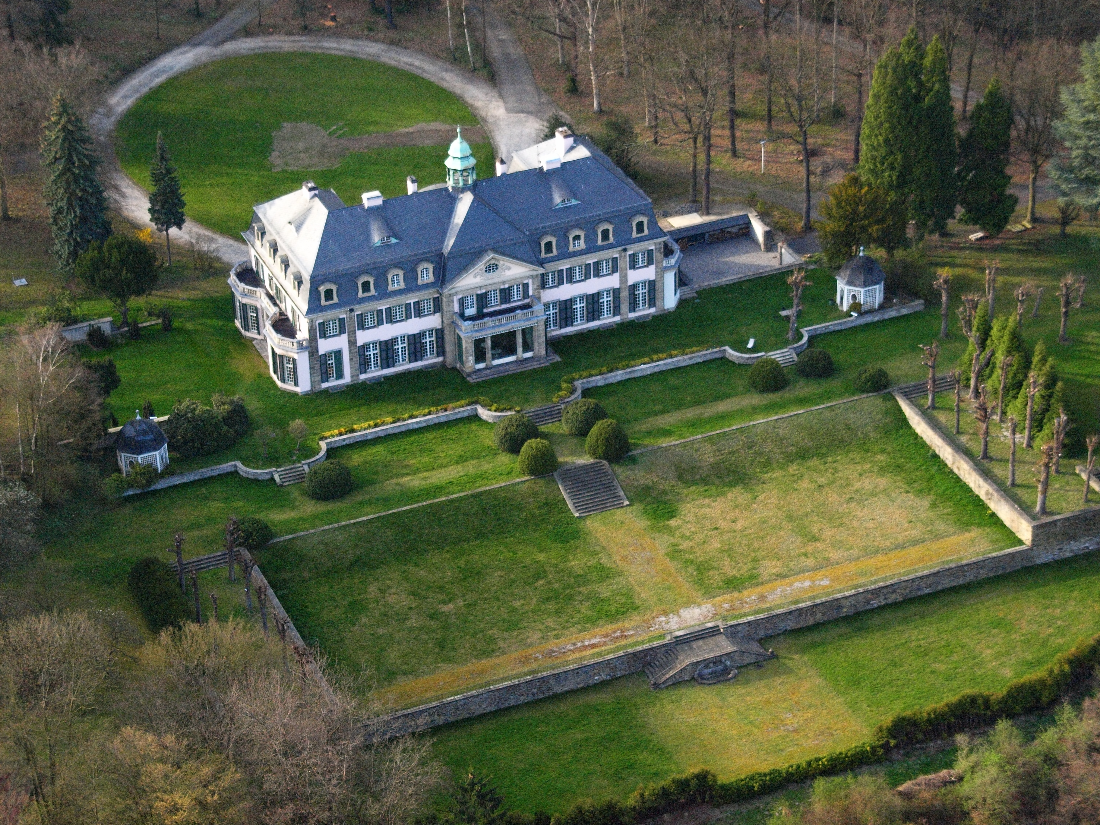 Schloss Ernich: Luftaufnahme